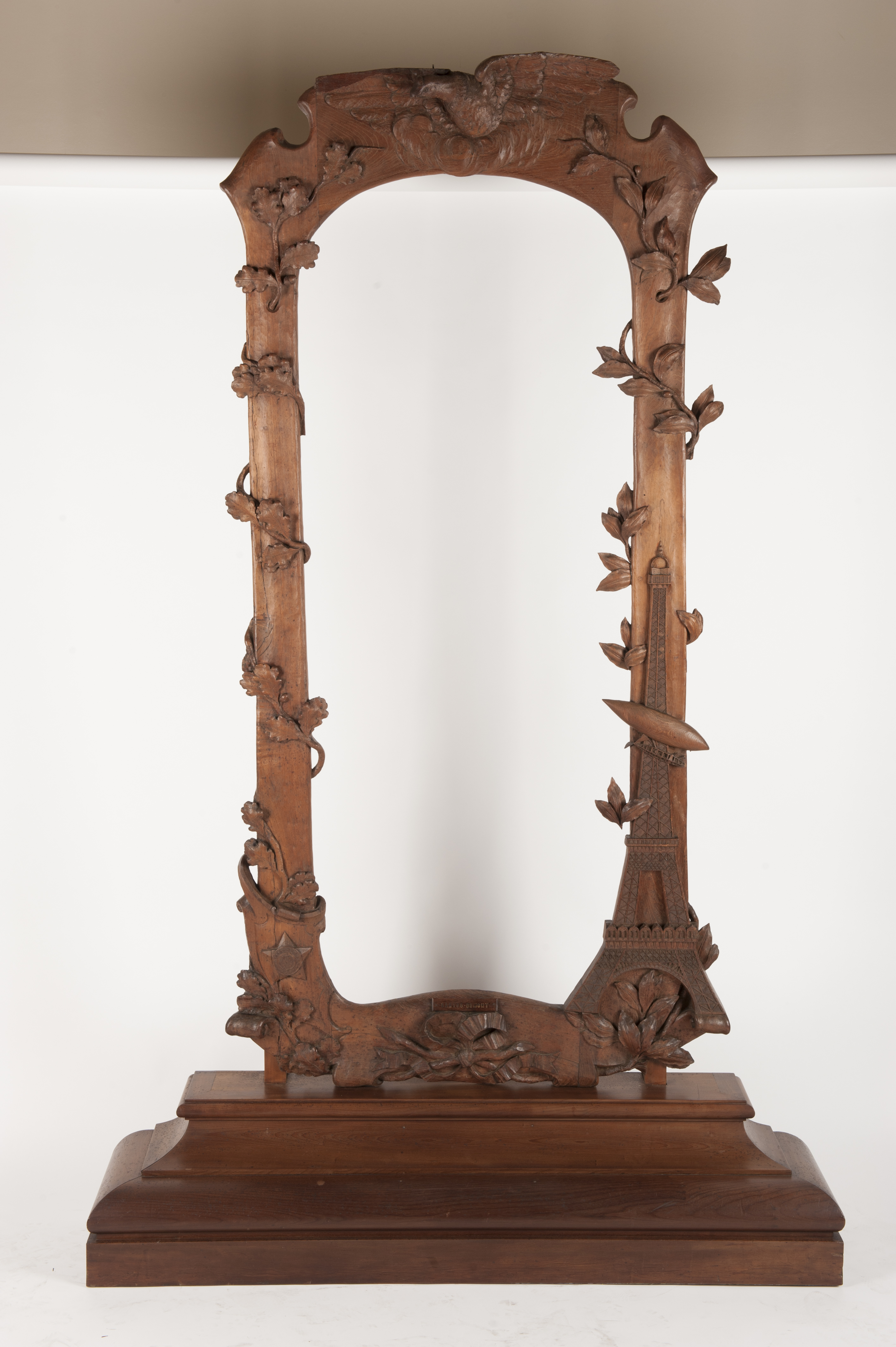 Espelho(?) oval com moldura metálica lisa e 6 pés de suporte